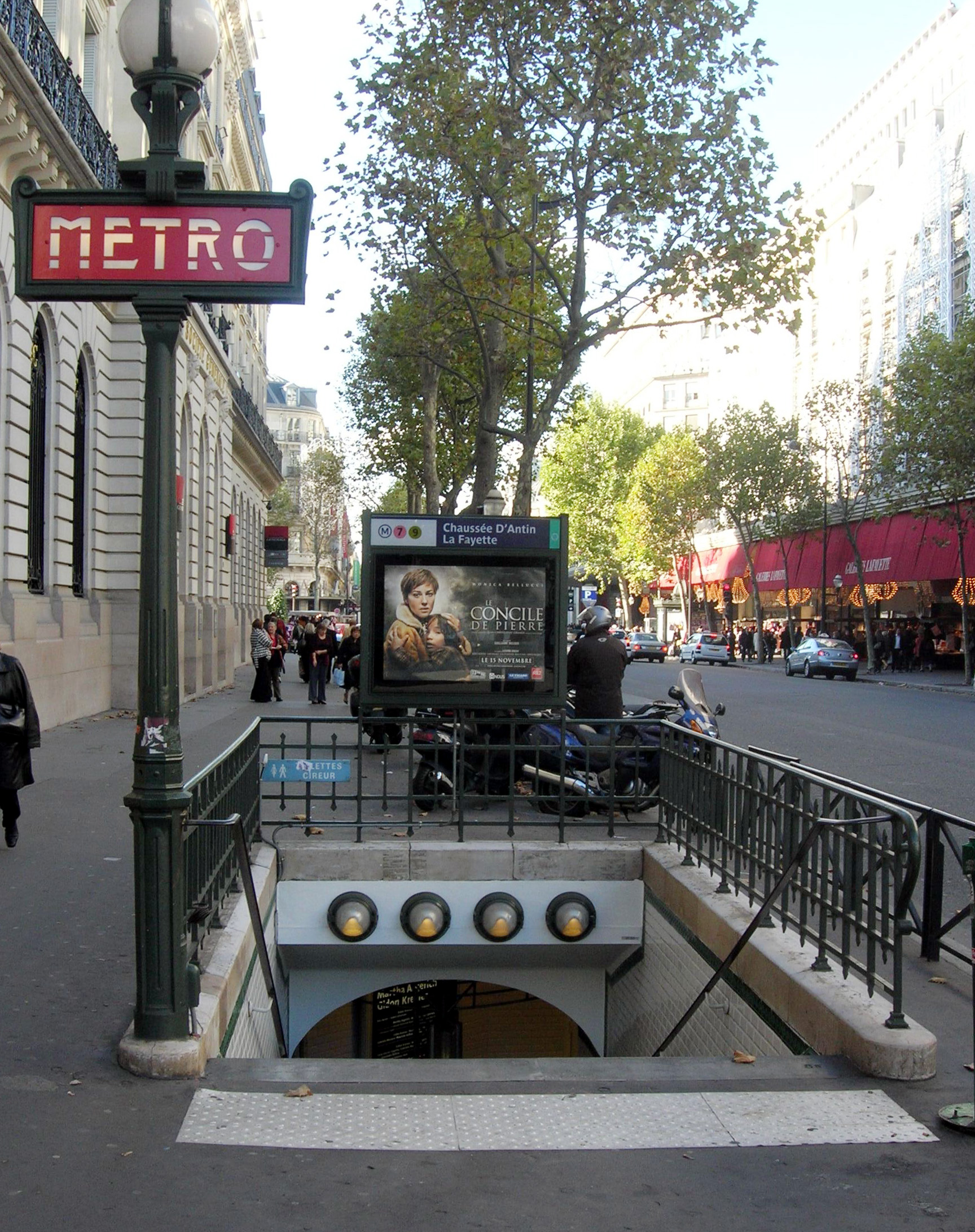 Bouche de métro (Station Chaussée d'Antin - La Fayette) à Paris